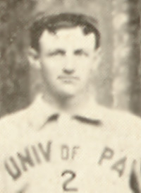 Sumner Bowman